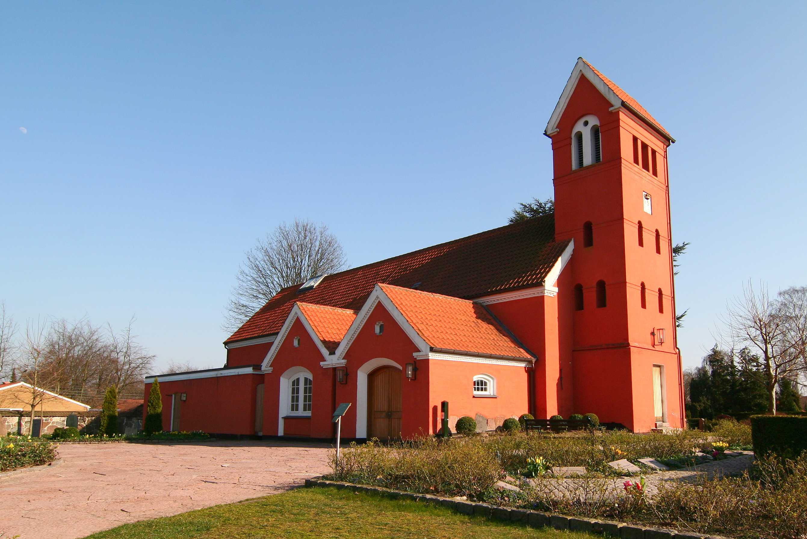 Rødovre Kirke